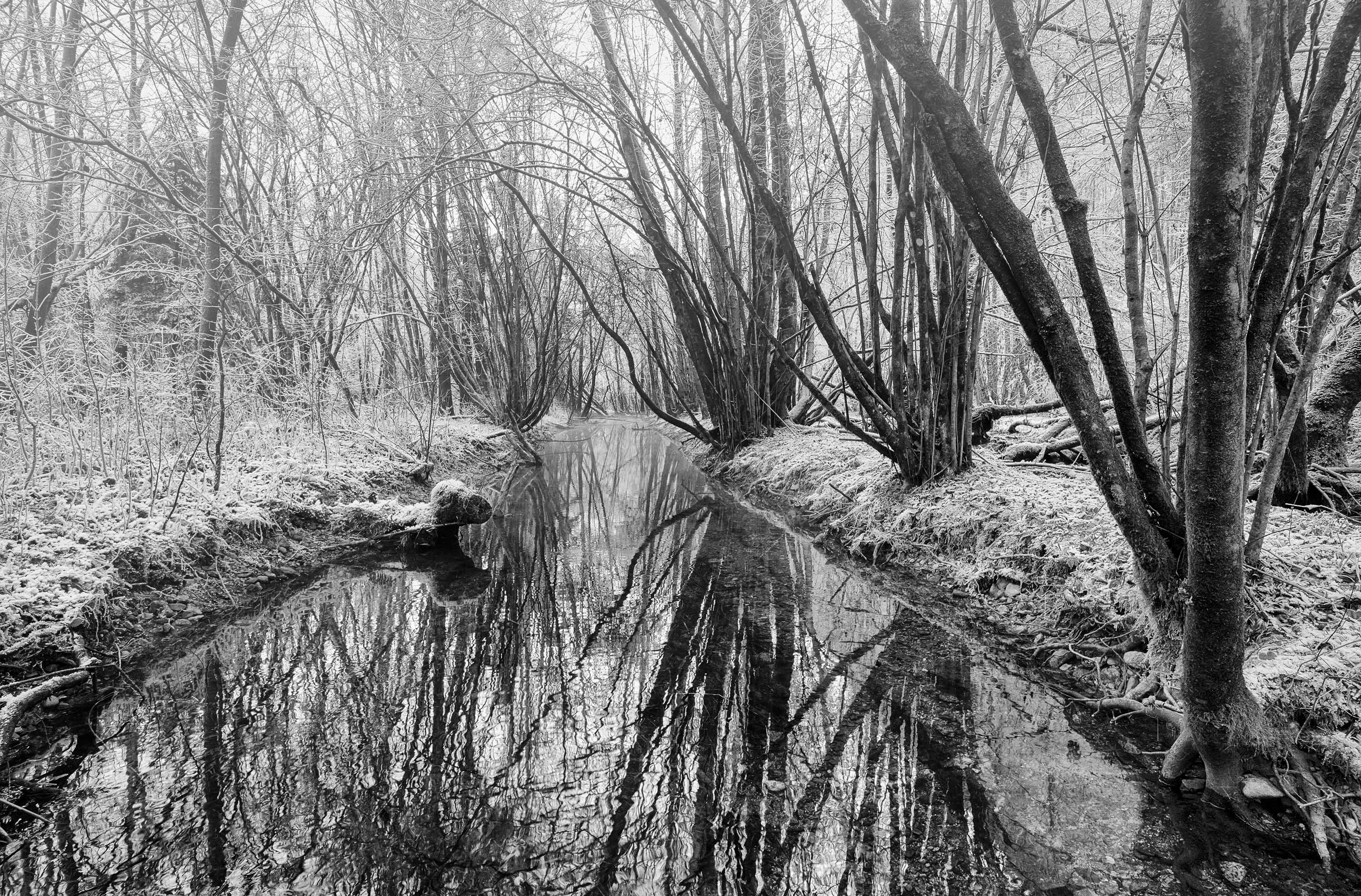 Biotopo Fontanazzo (Q3640209)